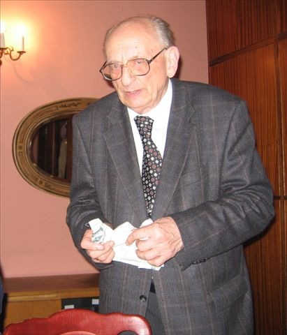 Władysław Bartoszewski (Warsaw, 19.02.1922, - Warsaw, 24.4.2015), Polish historian, publicist, writer and diplomat